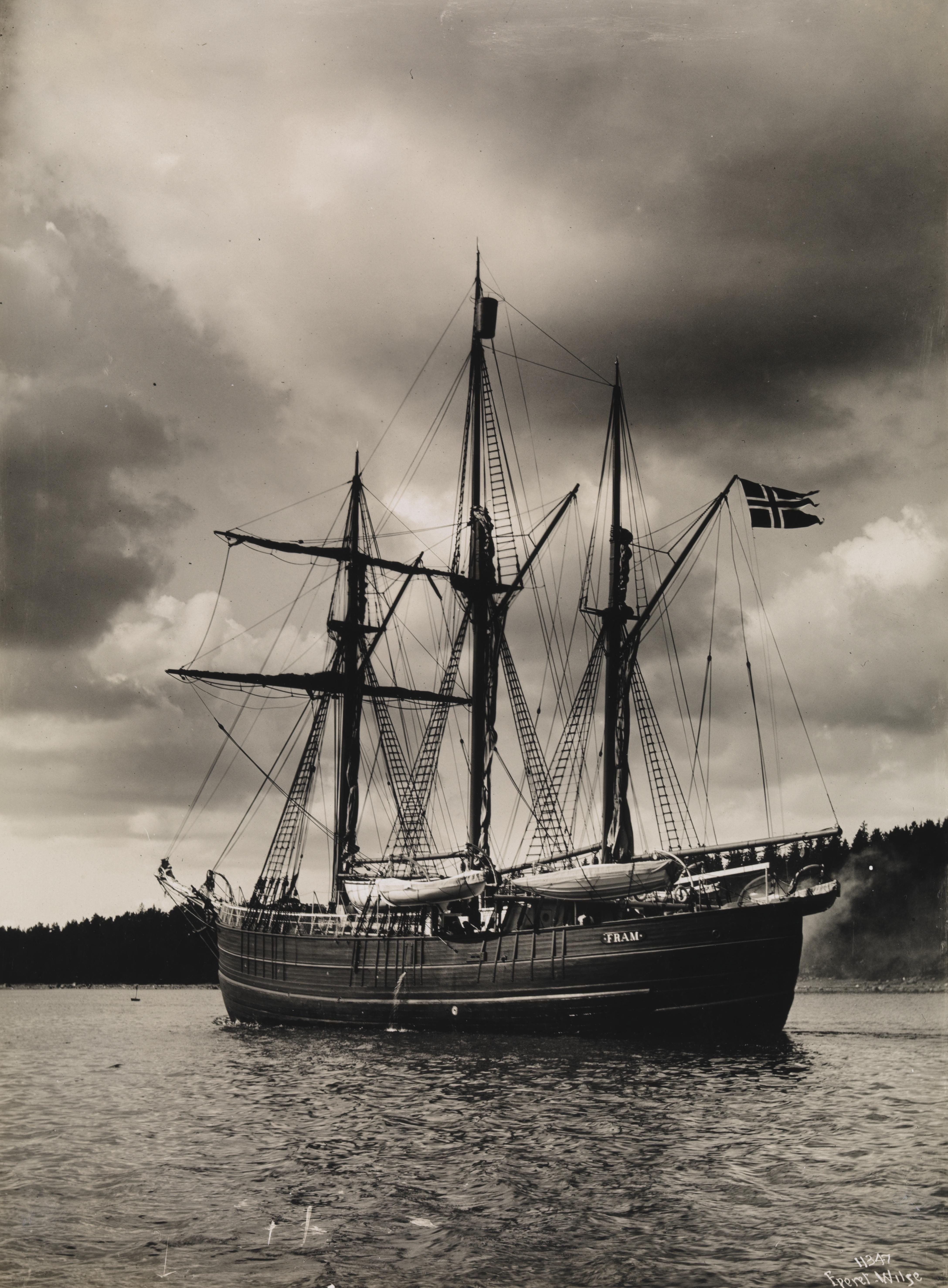 Bildet er hentet fra Nasjonalbibliotekets bildesamling Depicted person: Amundsen, Roald Engelbregt Gravning